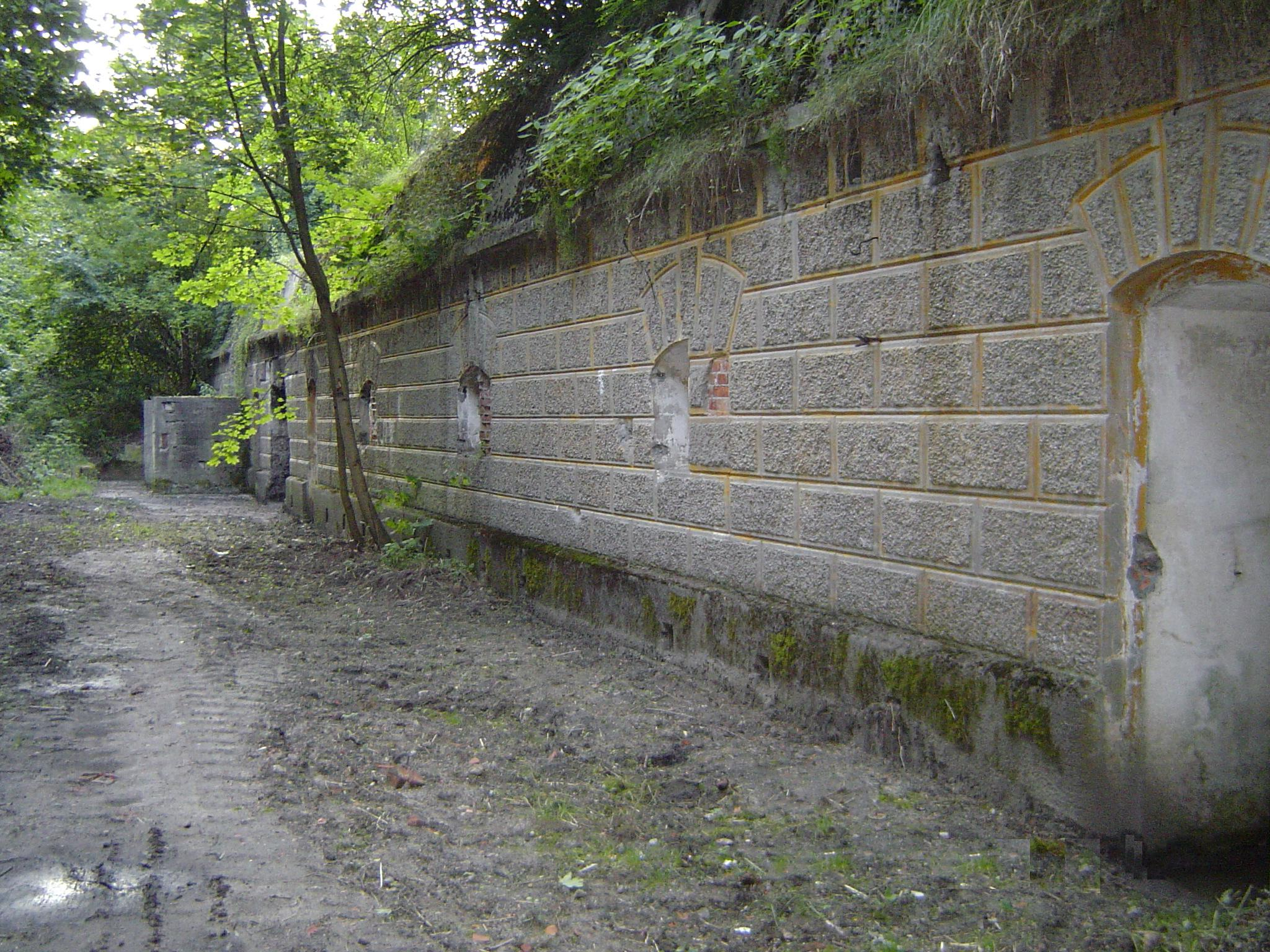 Fort Nowa Wieś w Grudziądzu